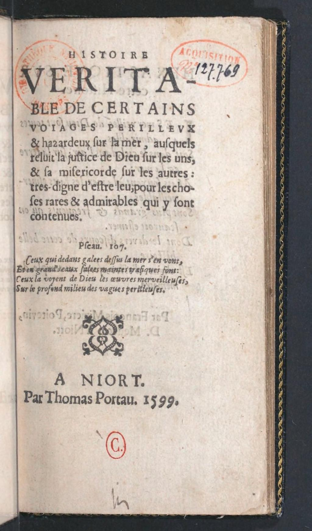 Histoire véritable de certains voiages périlleux et hazardeux de Bruneau de Rivedoux 1599